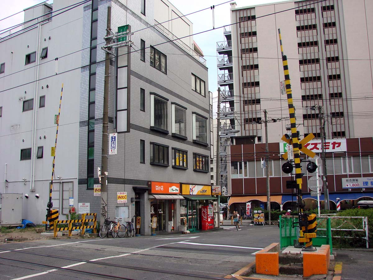 ＪＲ西日本 泥堂踏切